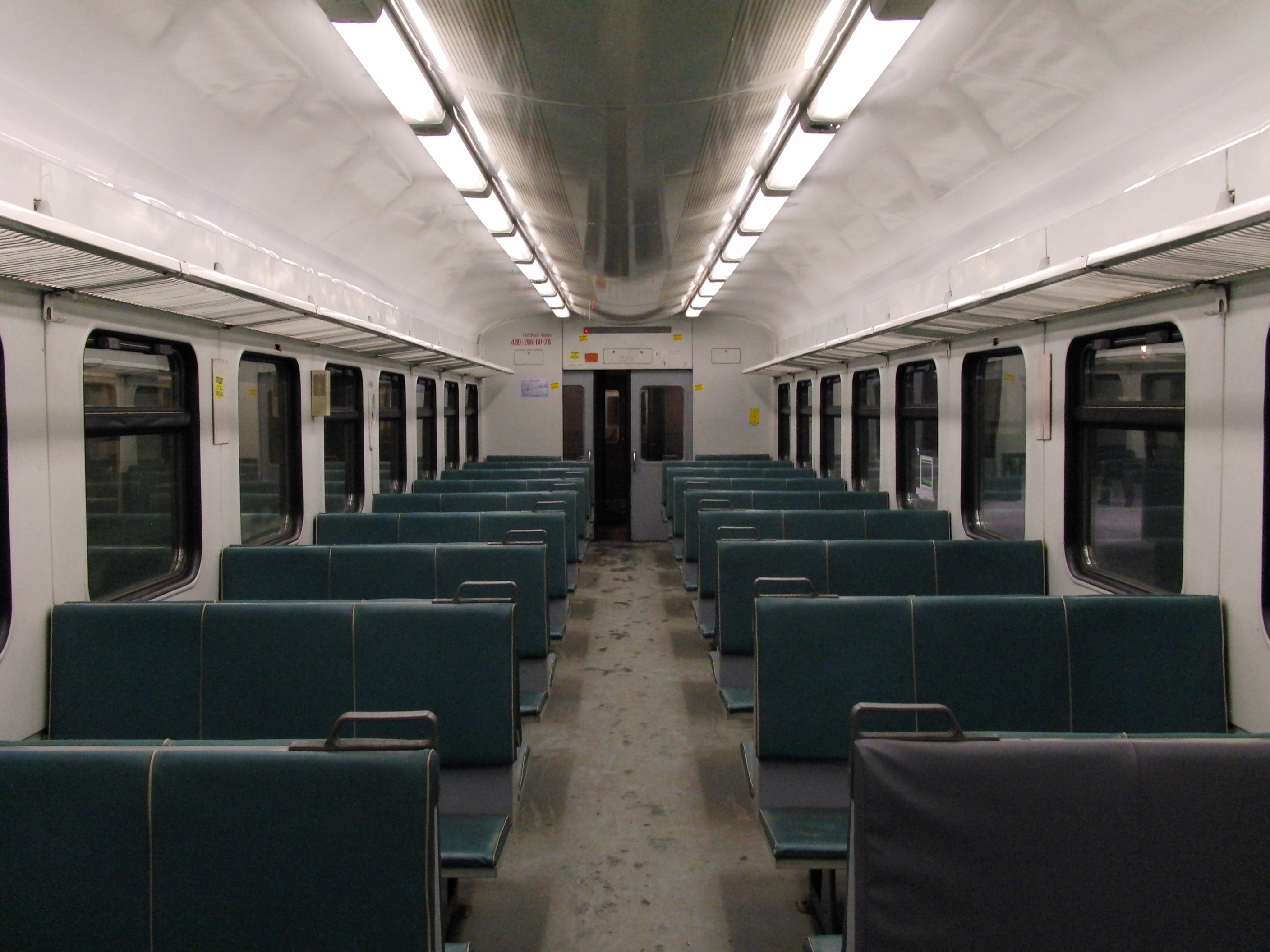 Interior of an ED4M local train (Интерьер электропоезда ЭД4М)